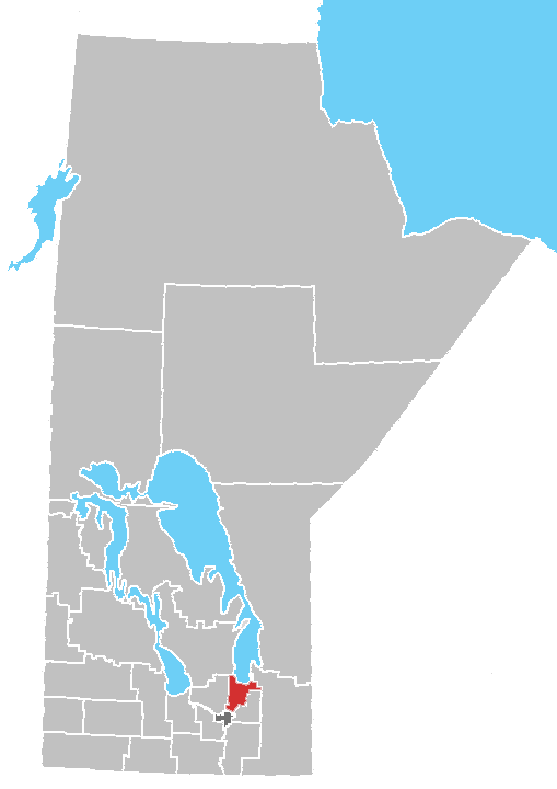 Manitoba census area No. 13